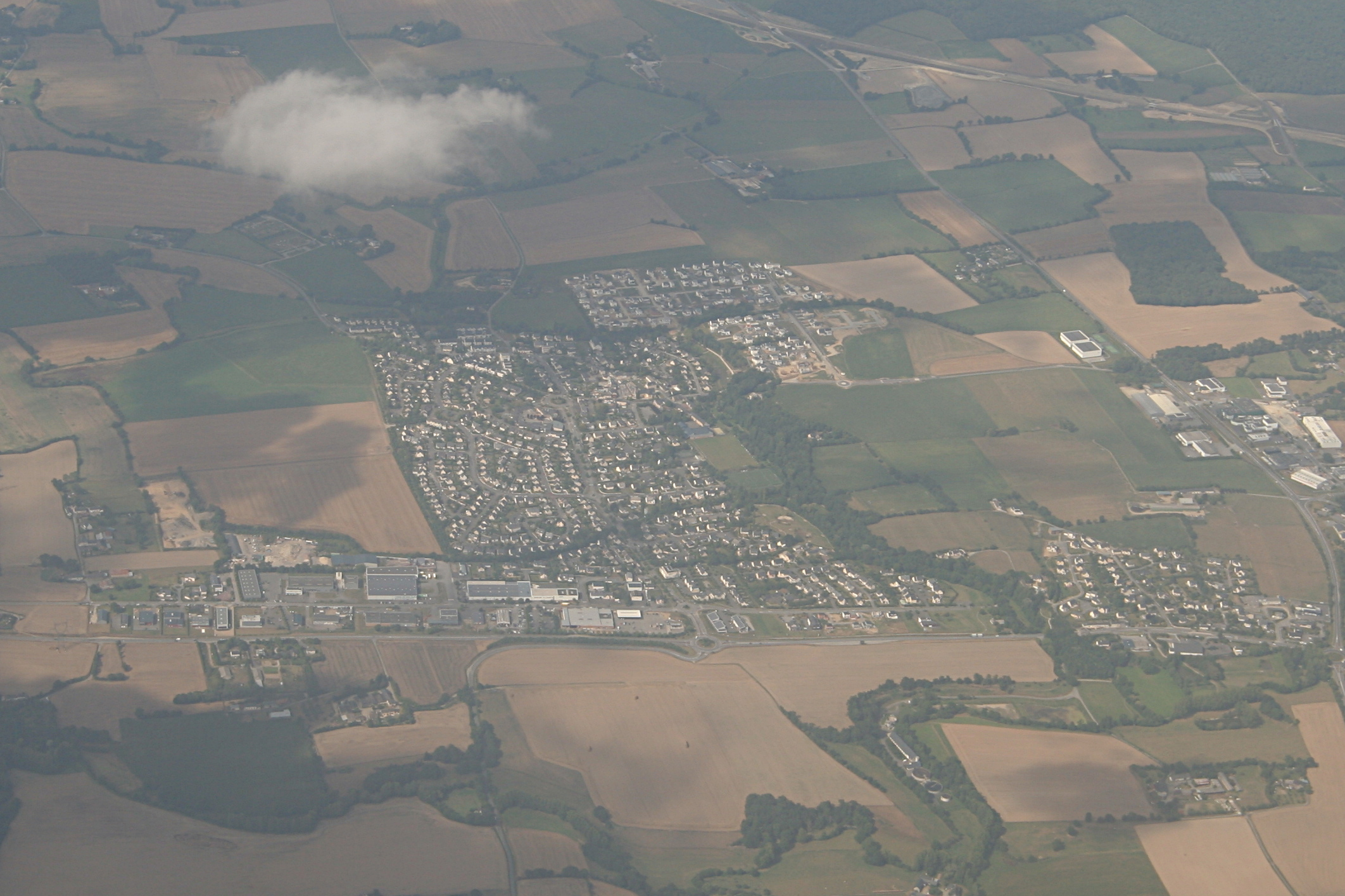 Vue aérienne de Domloup.